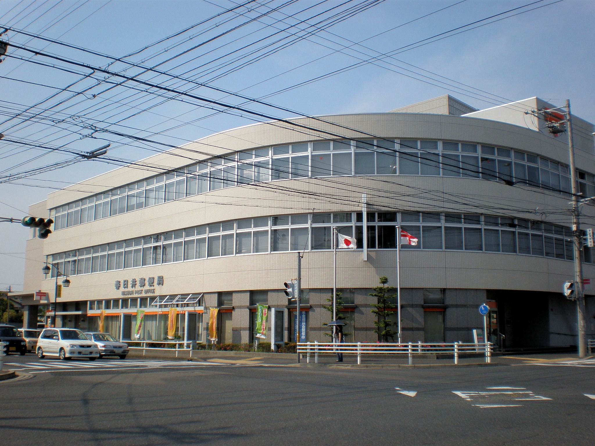 愛知県春日井市にある春日井郵便局